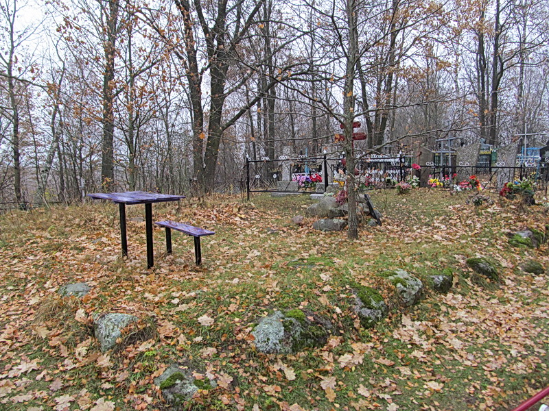 Рудня. Месца царквы на могілках